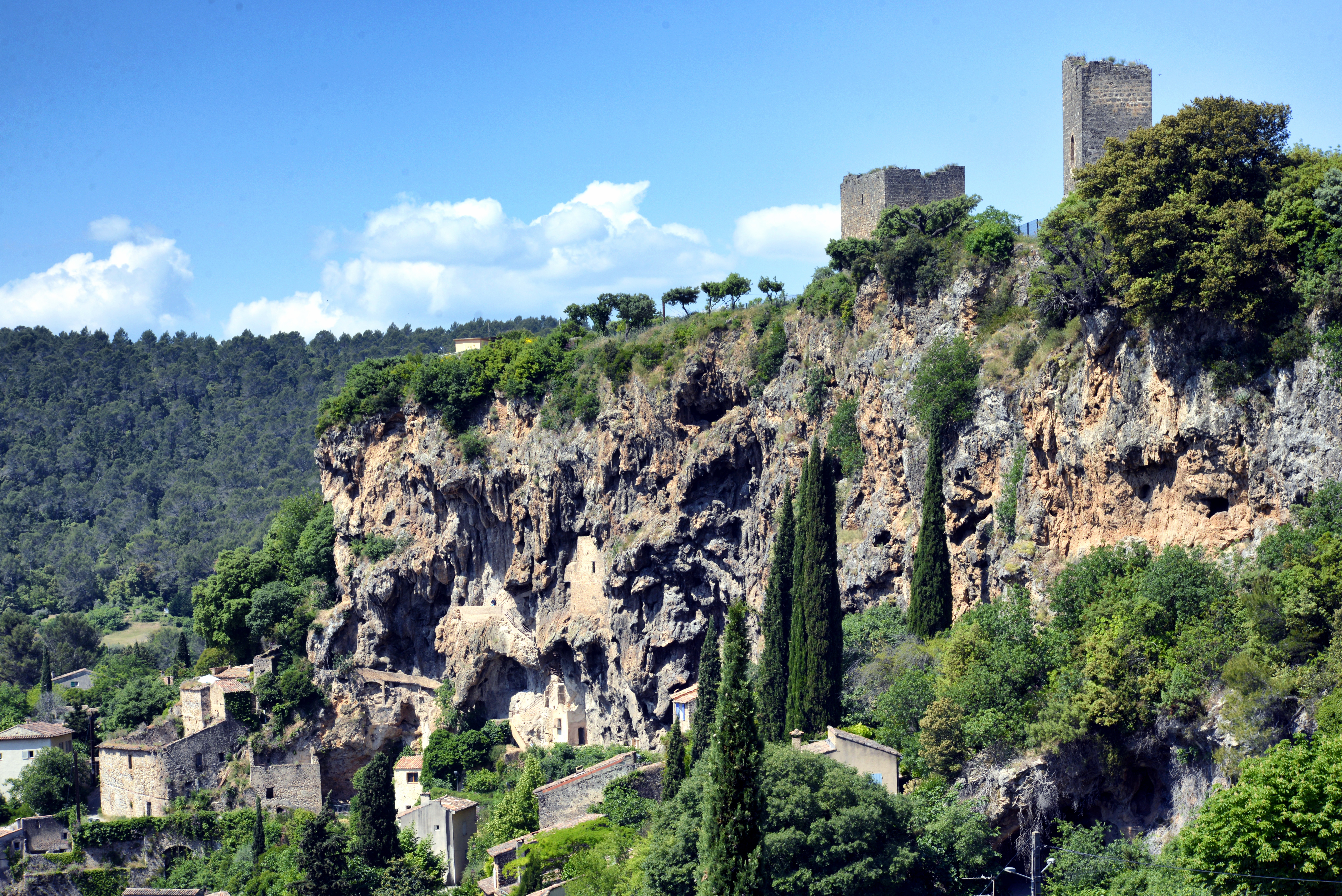 Cotignanc, Var (Provence) - Le rocher de Cotignac avec ses deux tours, vestiges de l'ancien château féodal (1033)